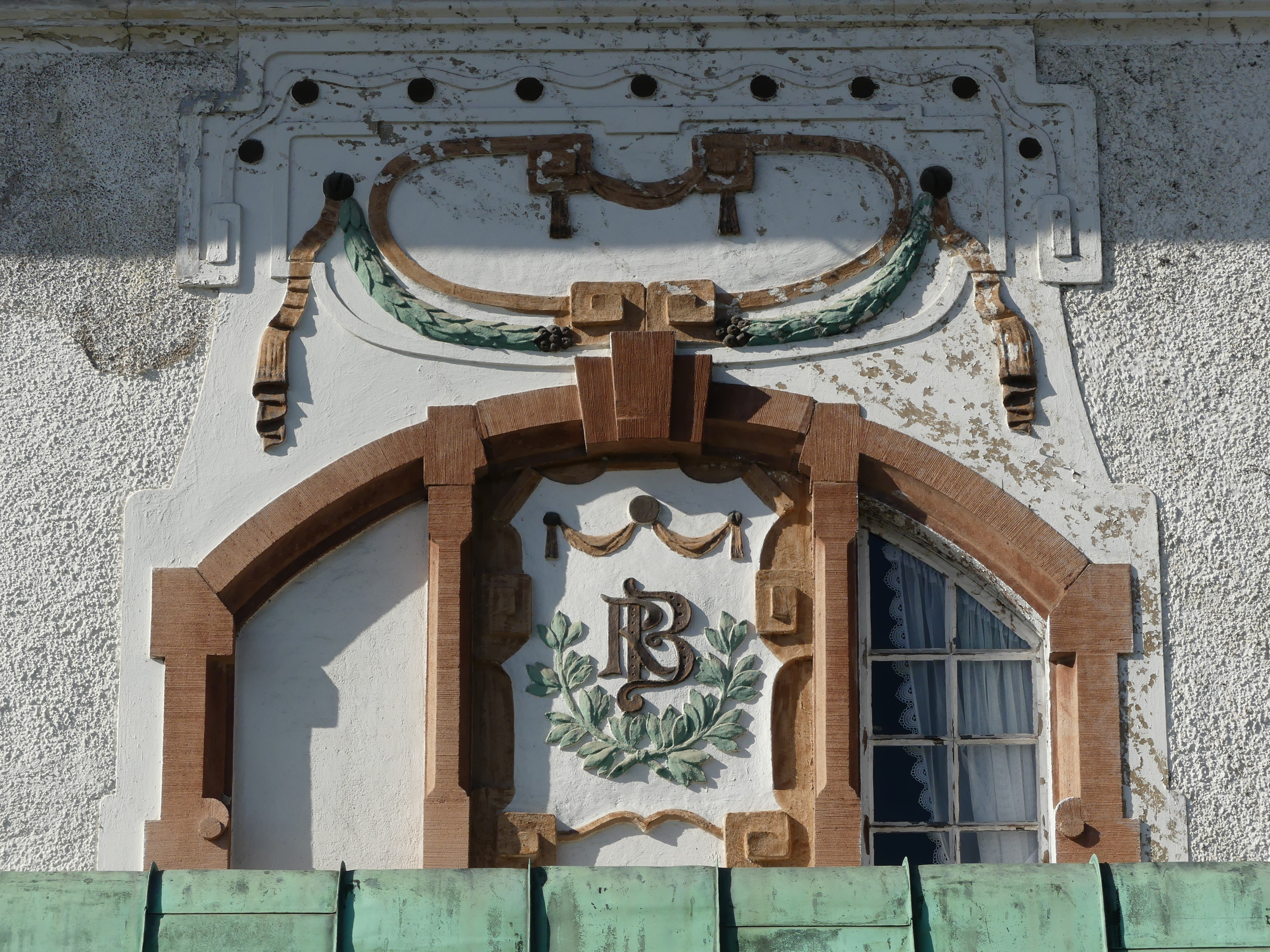 Das Haus Rheinstraße 4 in Lustenau im österreichischen Bundesland Vorarlberg, auch als „Villa Robert Bösch“ bezeichnet, ist ein für die großbürgerliche Bau- und Wohnkultur der Zeit um 1900 charakteristischer Jugendstilbau. Über dem Eingangsportal findet sich in einem zu 2/3 zugemauerten Fenster das Monogramm des Bauherren, Robert Bösch (RB).